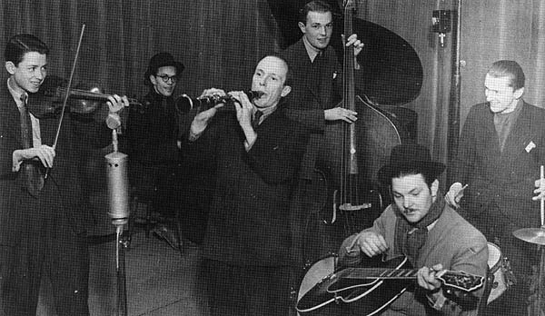 Casper Hjukström's sextet at a recording session in 1941. From left: Hasse Kahn, Ingemar Eriksson, Casper Hjukström, Lasse Nordvall, Folke Eriksberg and Åke Brandes.